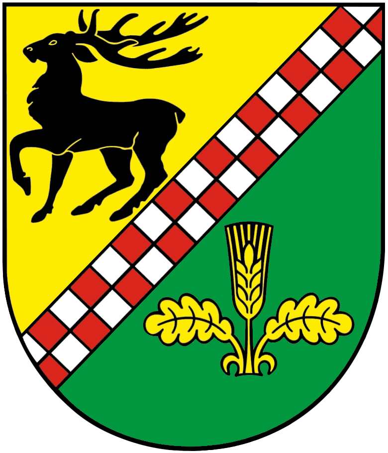 Wappen der Gemeinde Südharz Blasonierung: „Von Gold und Grün durch eine doppelreihig, zu 17 Plätzen von Silber und Rot geschachte Schräglinksleiste geteilt, oben ein schreitender schwarzer Hirsch, unten eine goldene Gerstenähre, begleitet von zwei goldenen Eichenblättern.“ Als geschichtlichen Bezug zeigt das Wappen einen schwarzen, schreitenden Hirsch auf goldenem Grund. Er ist das Wappentier der Stolberger Fürsten, welche über Jahrhunderte den größten Teil der Einheitsgemeinde Südharz geprägt haben. Geografisch ist die Südharzregion für ihre einzigartige Landschaft und ihre vielfältige Tier- und Pflanzenwelt bekannt. Dafür steht die Farbe Grün im unteren Feld des Wappens. Darauf sind in Gold eine Gerstenähre und zwei Eichenblätter dargestellt. Die Ähre symbolisiert die fruchtbare Goldene Aue und die Eichenblätter stehen für den Waldreichtum der Südharzregion. Die beiden Bereiche des Wappens werden durch eine geschachtete Schräglinksleiste verbunden. Die Quadrate versinnbildlichen die unterschiedlichen Ortsteile, welche gemeinsam ein harmonisches Bild ergeben. Die Farben Rot und Silber sind die dominierenden Farben im Wappen des Landkreises Mansfeld-Südharz.